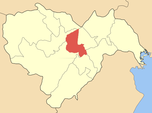 Дем Апостол Павел на картата на Ном Иматия, Гърция. Locator map of Apostolou Pavlou municipality (Δήμος Αποστόλου Παύλου) at Imathias perfecture, Greece.